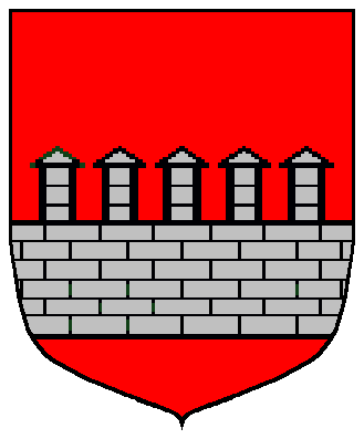 Escut dels vescomtes de Vilamur (Pallars Jussà i Pallars Sobirà)Escut creat per l'autor amb el programa, legalment adquirit, Blasons & Armoiries.